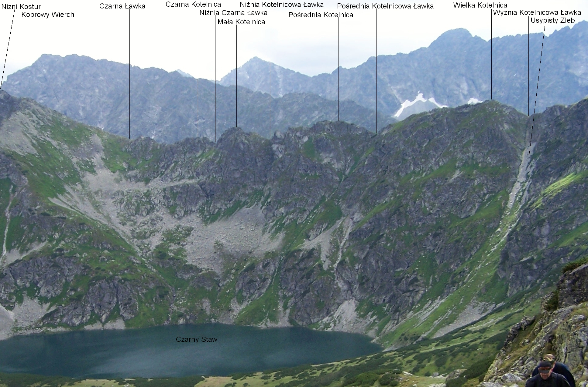 Kotelnica